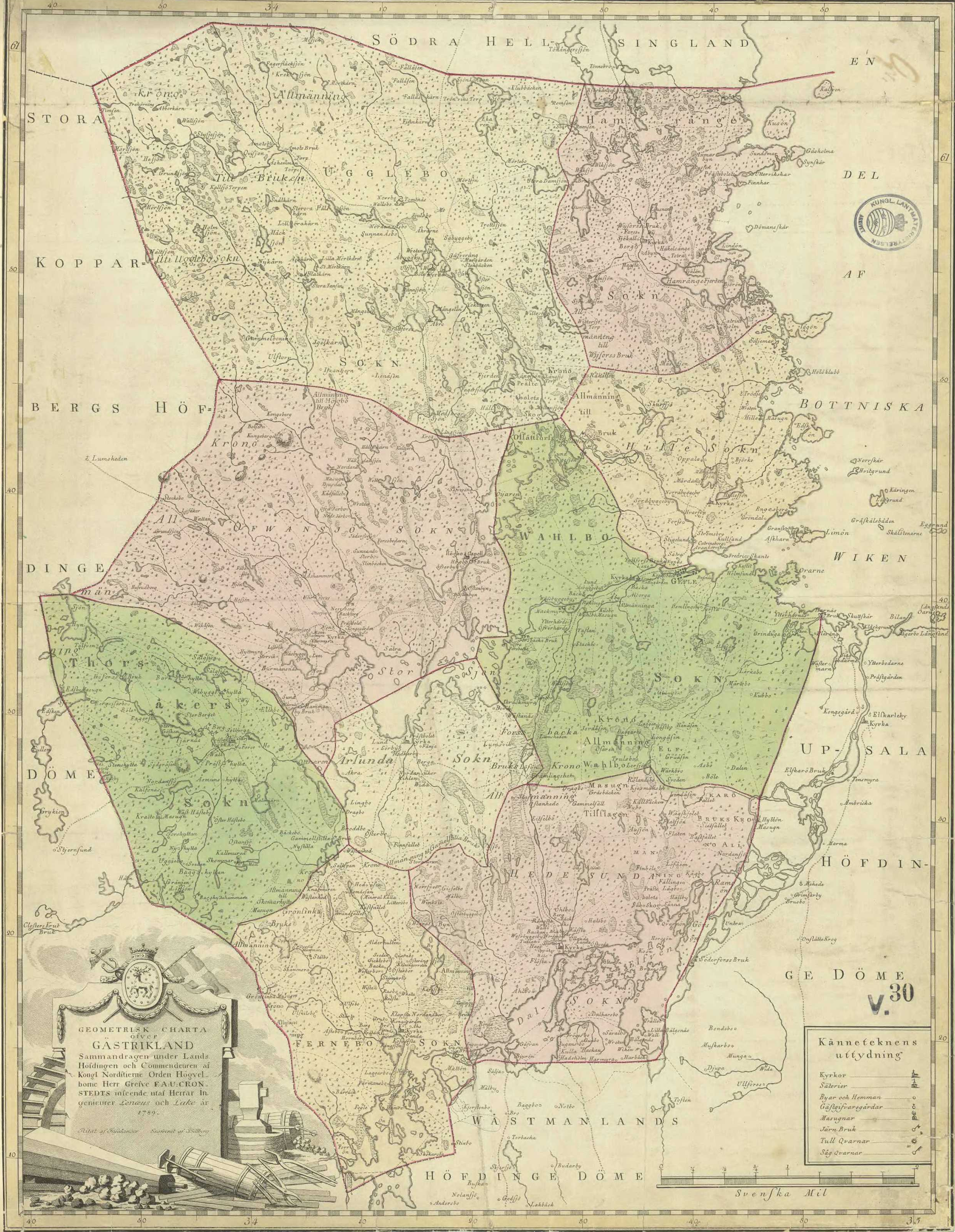 Historisk karta över Gästrikland.